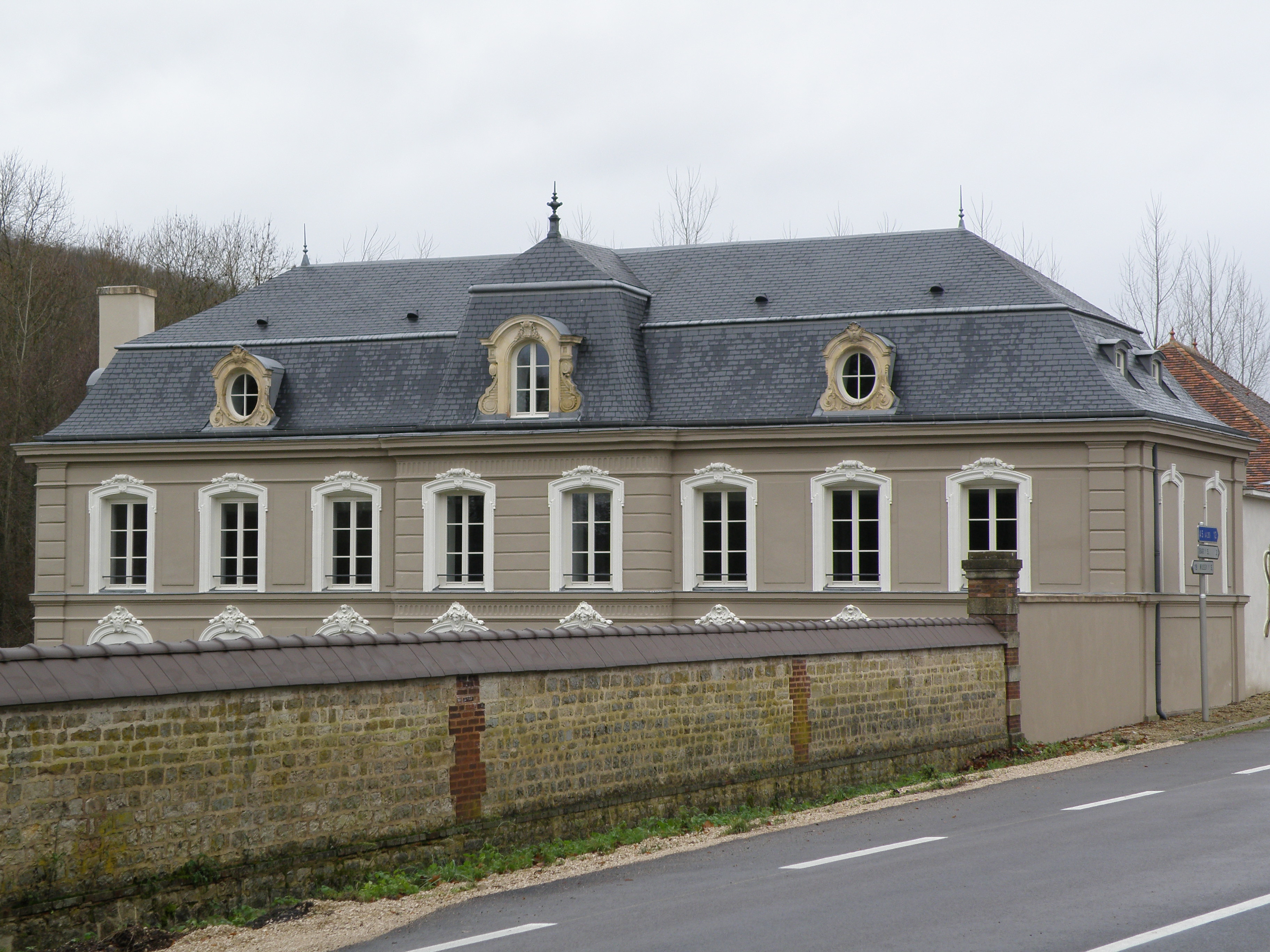 Chateau de Villeneuve, 10110 Bar-sur-Seine